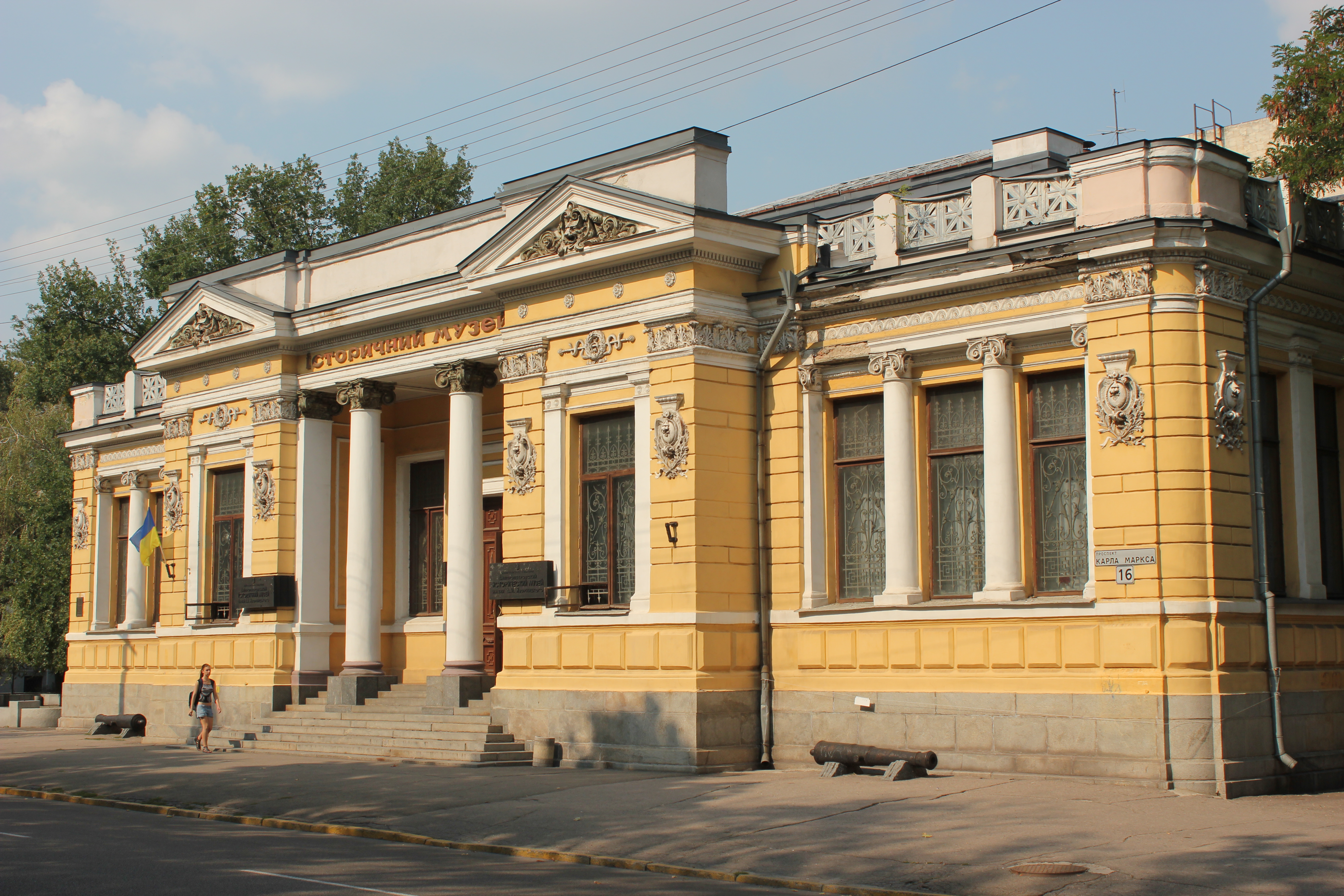 Історичний музей Дніпропетровська